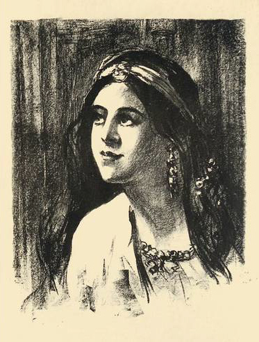 „Rahel“, Lithographie, 1920, aus der Mappe: Biblische Gestalten. Fritz Gurlitt, Berlin 1921.